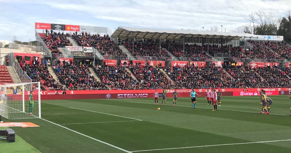 Victoria 6-0 contra la UD Las Palmas